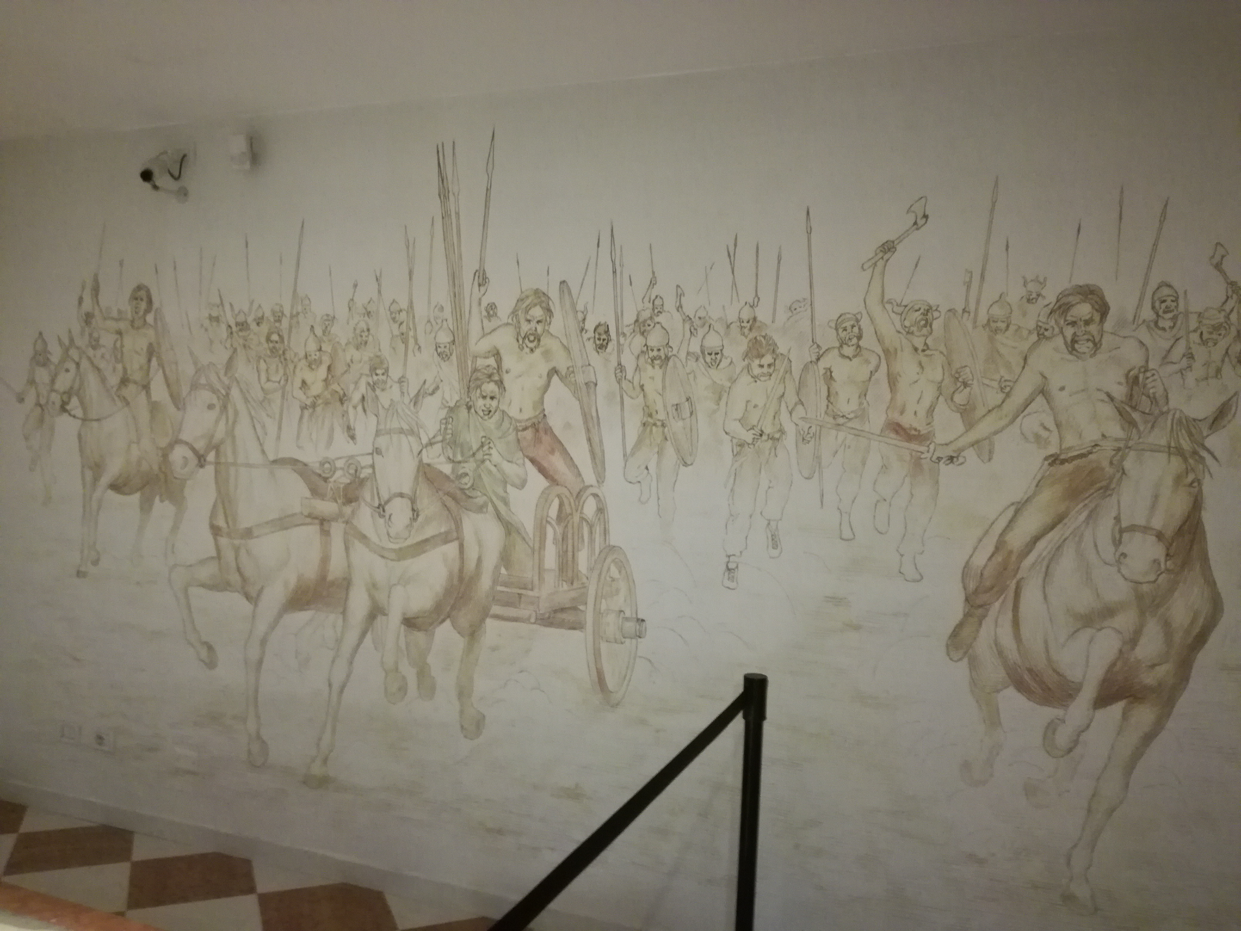 Affresco dipinto nel muro laterale di destra della Tomba della biga al Museo Archeologico di Adria